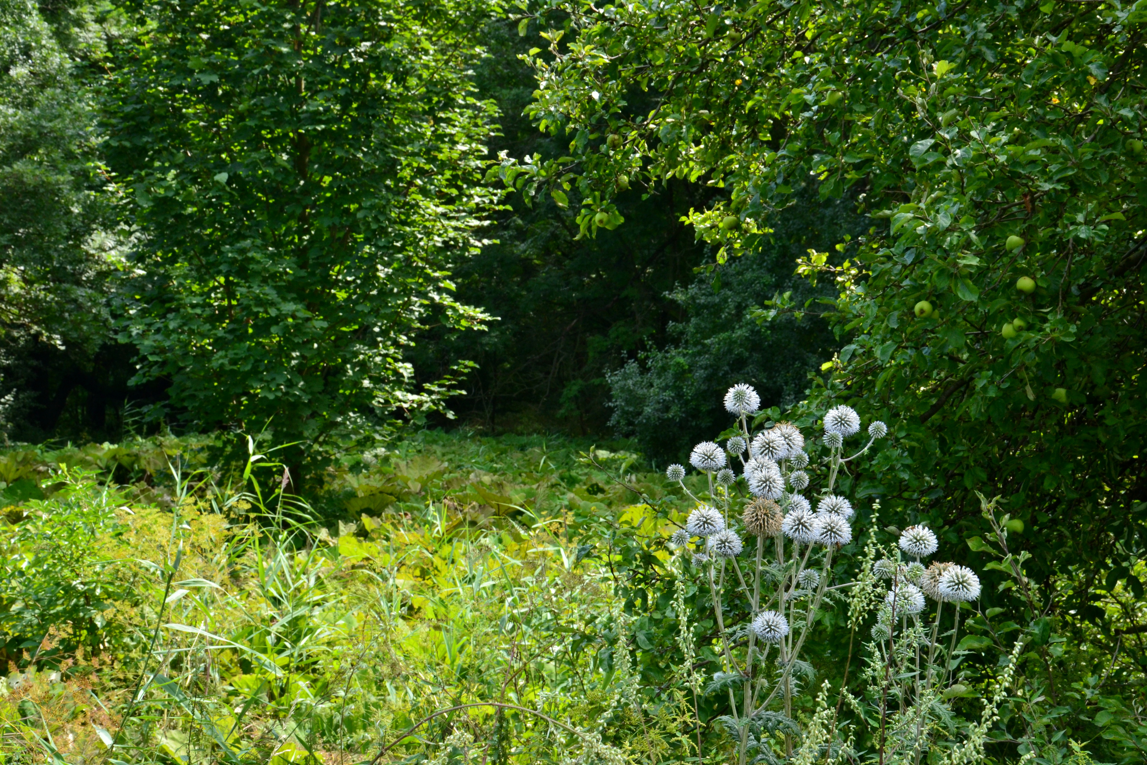 Zarostlý odtok bezpečnostního přelivu